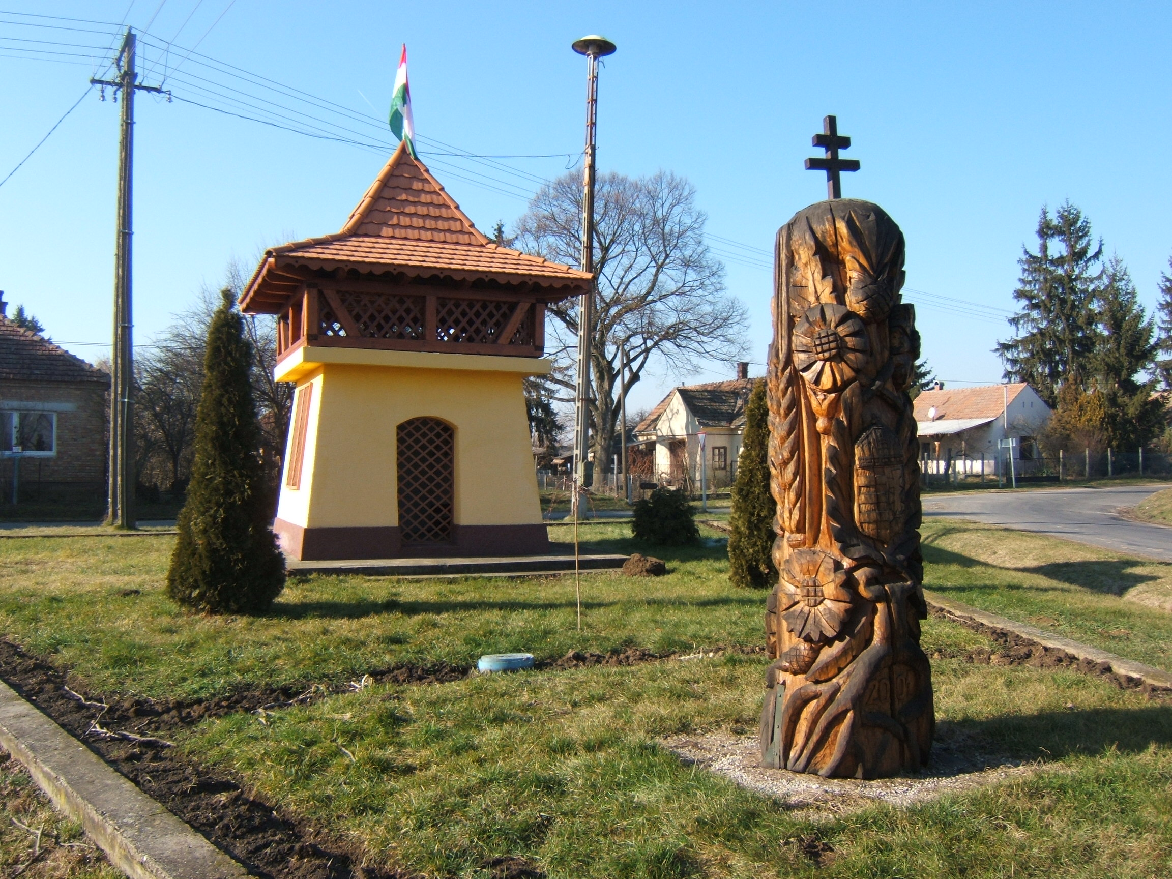 Csákány, Fő utca-Kossuth utca talákozása